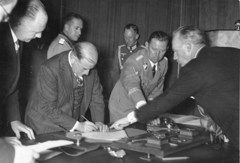 Münchener Abkommen, Unterschrift Daladier ADN-ZB/Archiv 30.9.1938 Unterzeichnung des Münchener Abkommens, UBz: Der französische Ministerpräsident Daladier bei der Unterzeichnung. v. links Gesandter [Paul Otto Gustav] Schmidt (Dolmetscher), der ital. Außenminister Graf Ciano, Major Schmundt (militär. Adjutant Hitlers), SS-Gruppenführer Schaub (SS-Adjutant Hitlers), Außenminister von Ribbentrop. 16045-38 [Daladier bei der Unterzeichnung des Münchener Abkommens, 30.9.1938,] Abgebildete Personen: Daladier, Edouard: Ministerpräsident, Vorsitzender Sozialistische Partei, Frankreich Schaub, Julius: SS-Gruppenführer, persönlicher Adjutant Adolf Hitlers, Deutschland Ribbentrop, Joachim von: Außenminister, NSDAP, Deutschland Ciano, Galeazzo Graf: Außenminister, Italien (GND 119178362)